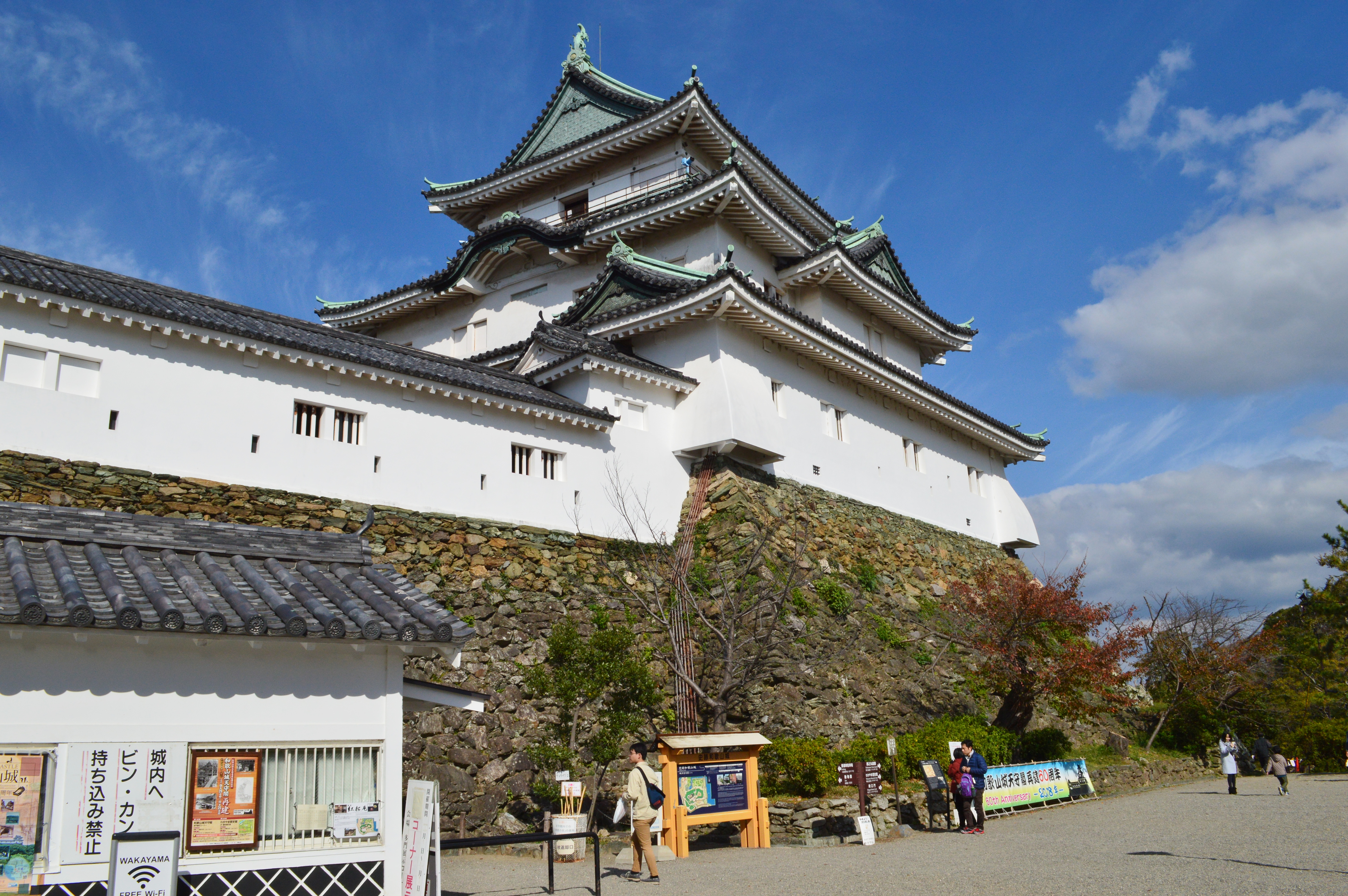 和歌山城 天守